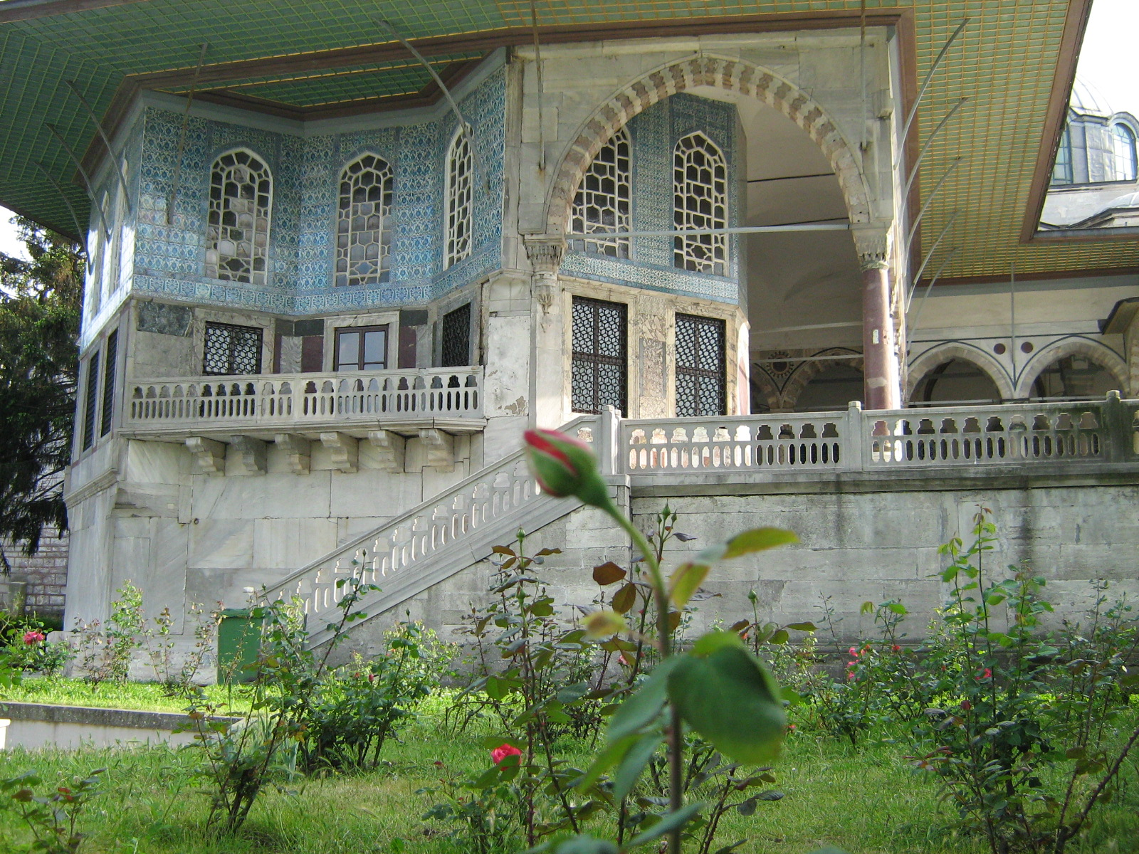 Kategori:İstanbul resimleri